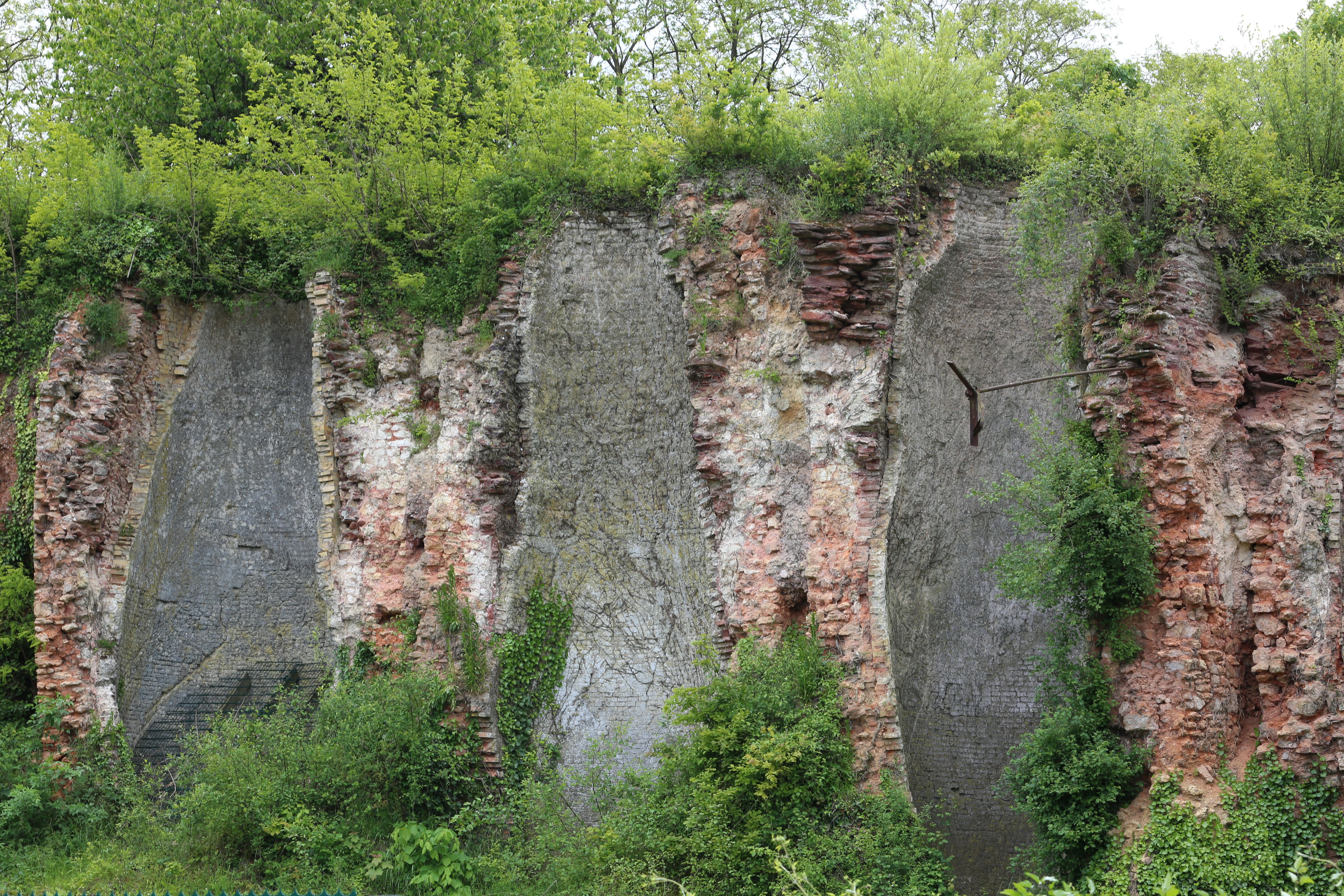 Les fours à chaux de la rue des Fours à Chaux à Chartres-de-Bretagne.